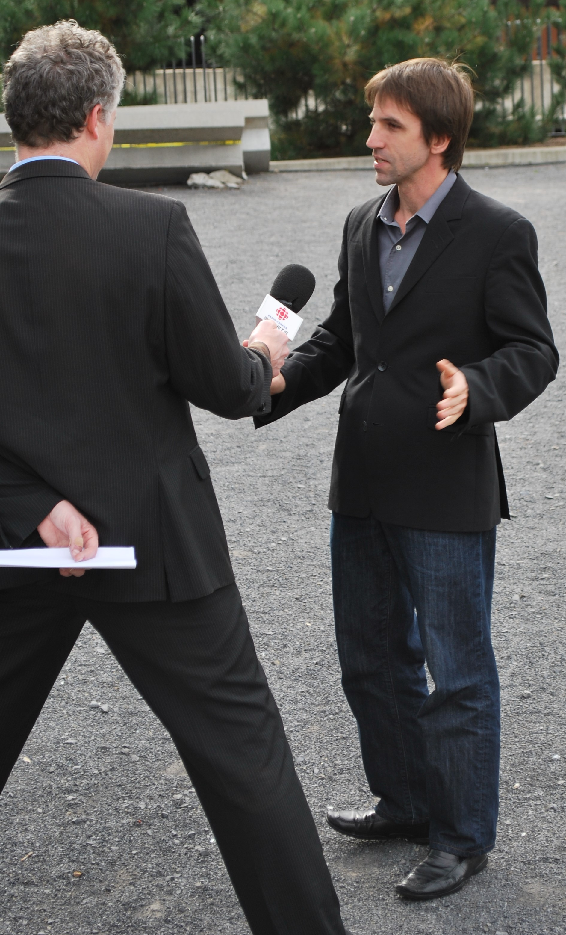 Steven Guilbeault, représentant de Greenpeace au Québec, en entrevue pour la Société Radio-Canada.